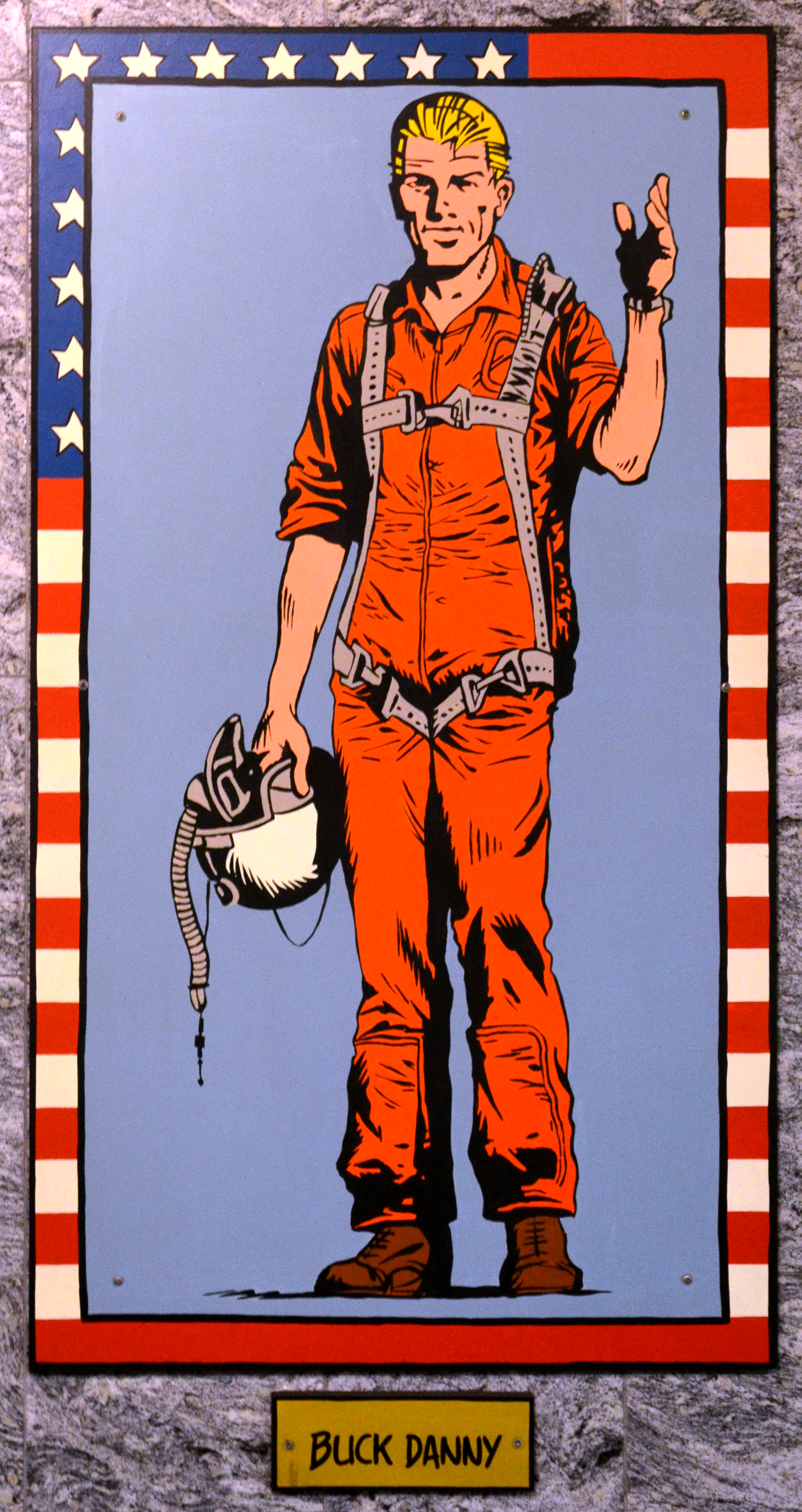 Charleroi (Belgique) - Station Janson du métro léger. Buck Danny.